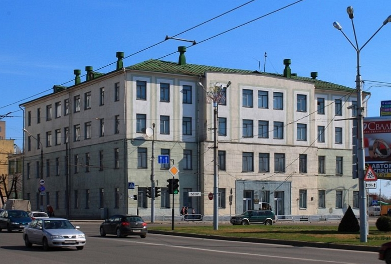 Магілёўскае рэальнае вучылішча